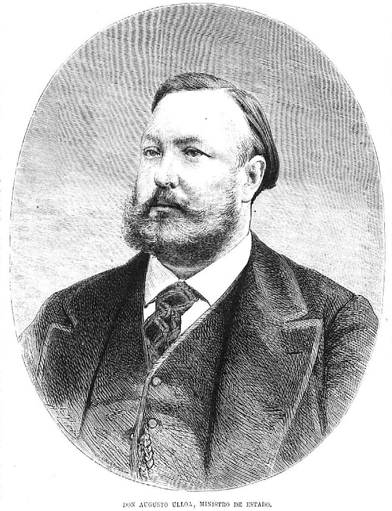 Retrato de Augusto Ulloa, publicado en la revista española La Ilustración Española y Americana.